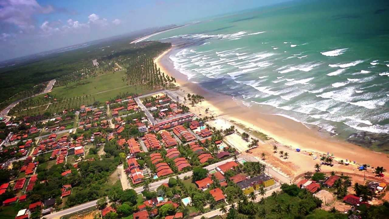 Praia de Itapuama em Cabo de Santo Agostinho - PE - Brasil.